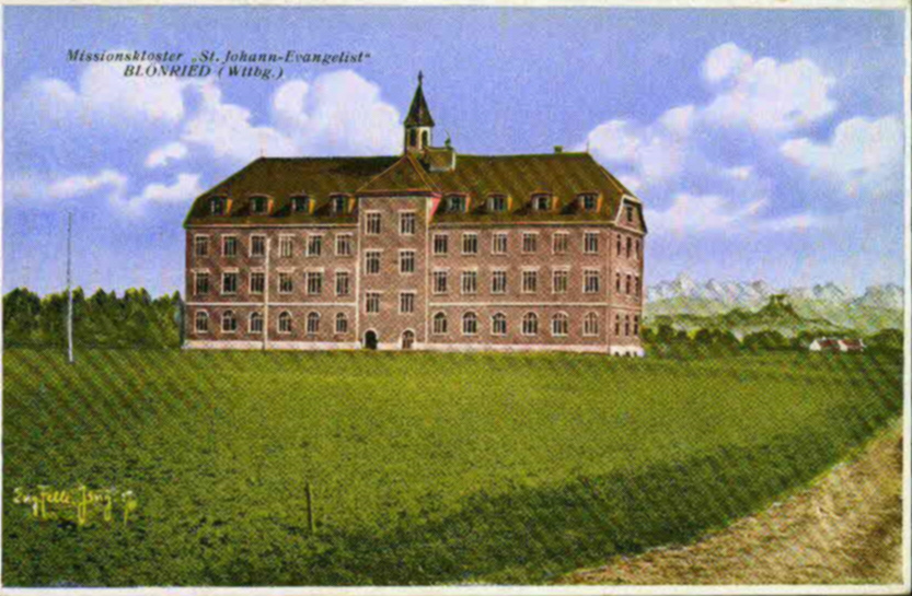 Ansichtskarte von Eugen Felle; Technoseum (Landesmuseum für Technik und Arbeit Mannheim)Motiv: Blönried, Missionskloster St. Johann-Evangelist